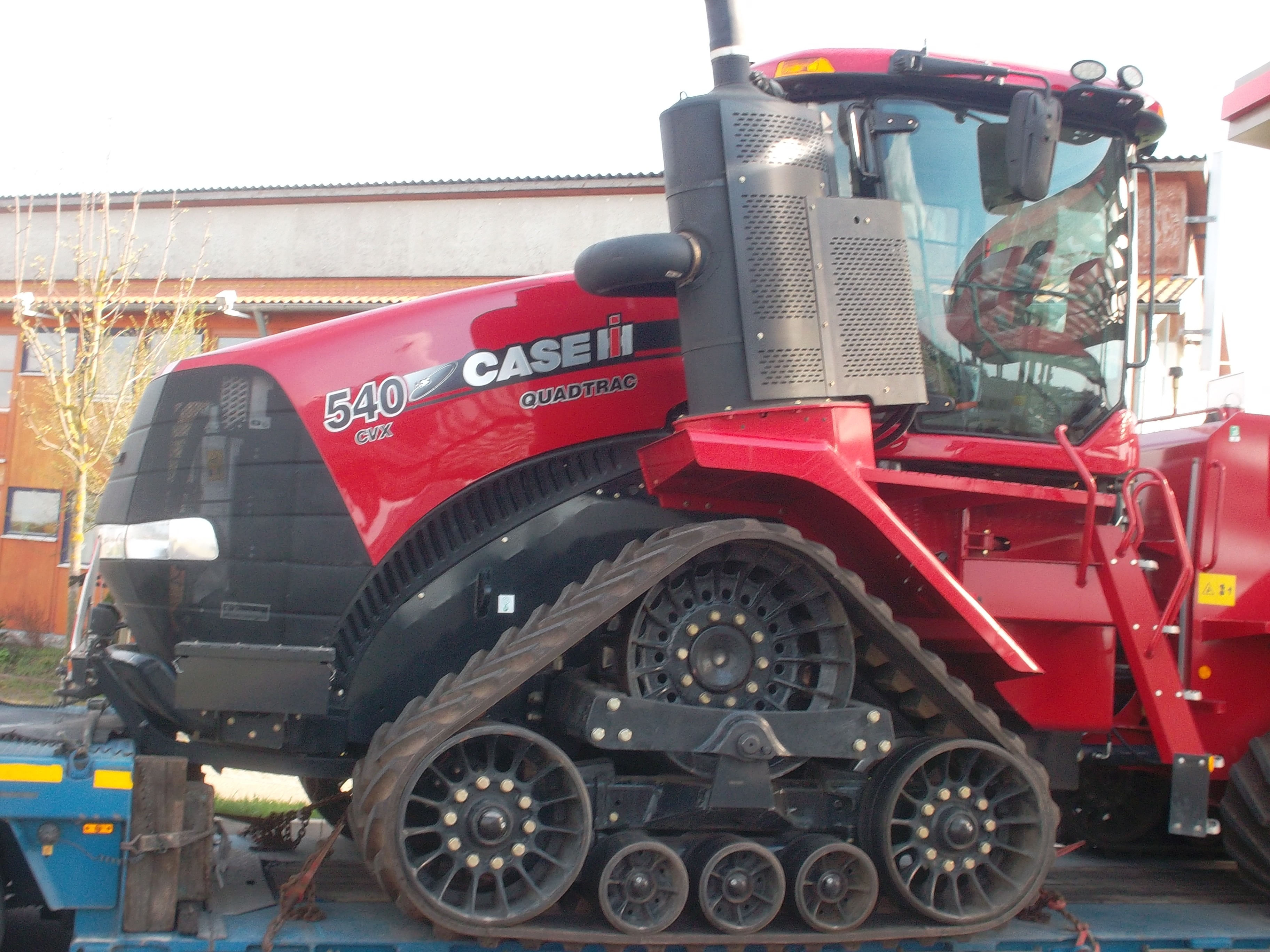 Führerhaus des Quad-Traktor Case IH CVX 540